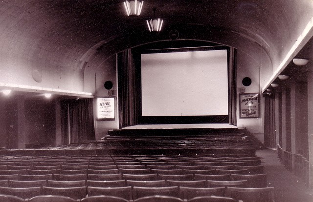 Moziterem az 1960-as években a József Attila Kultúrházban (Magyarország, 1131 Budapest, József Attila tér 4.)